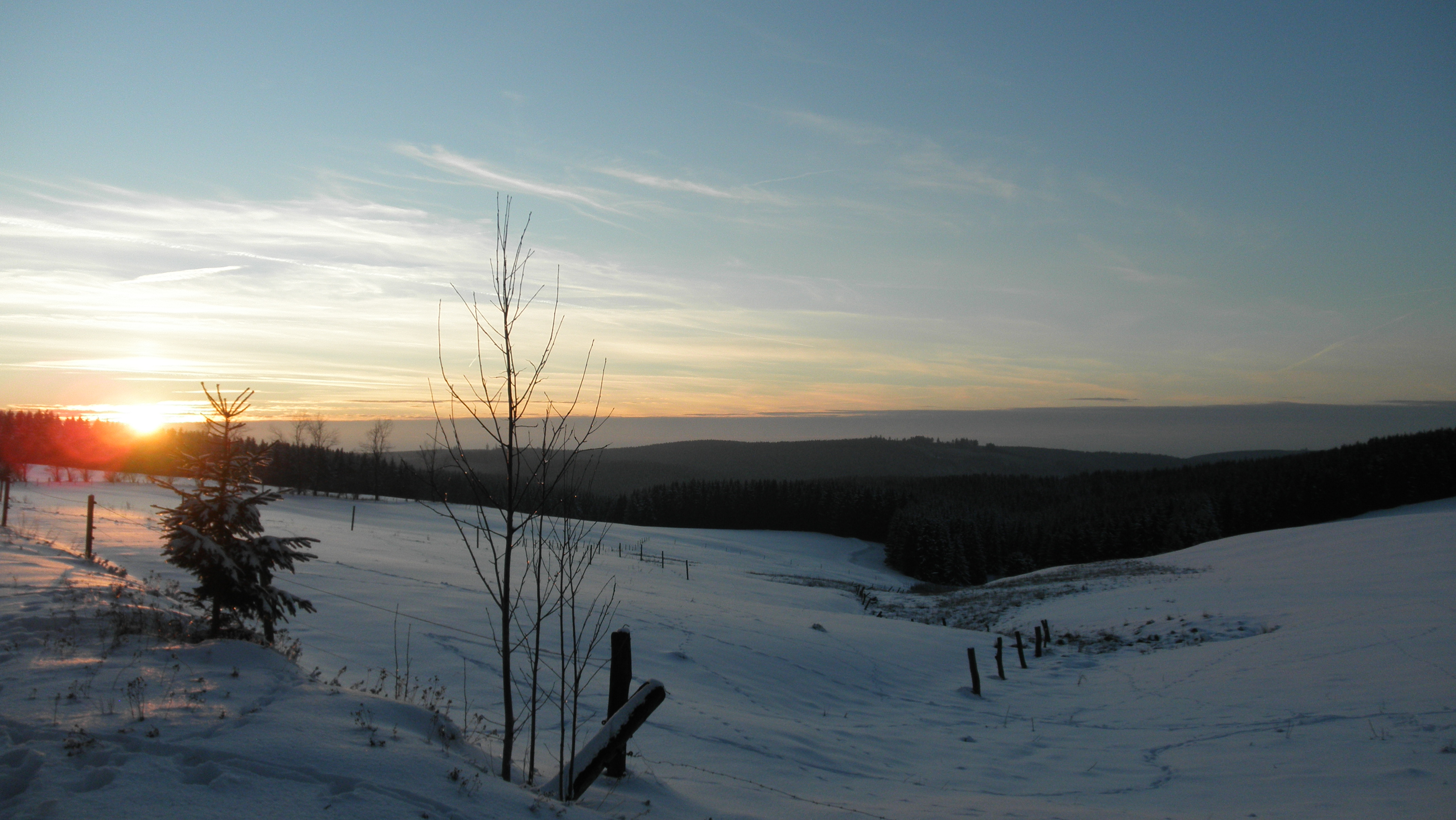 Kleines Clausthal - Winter